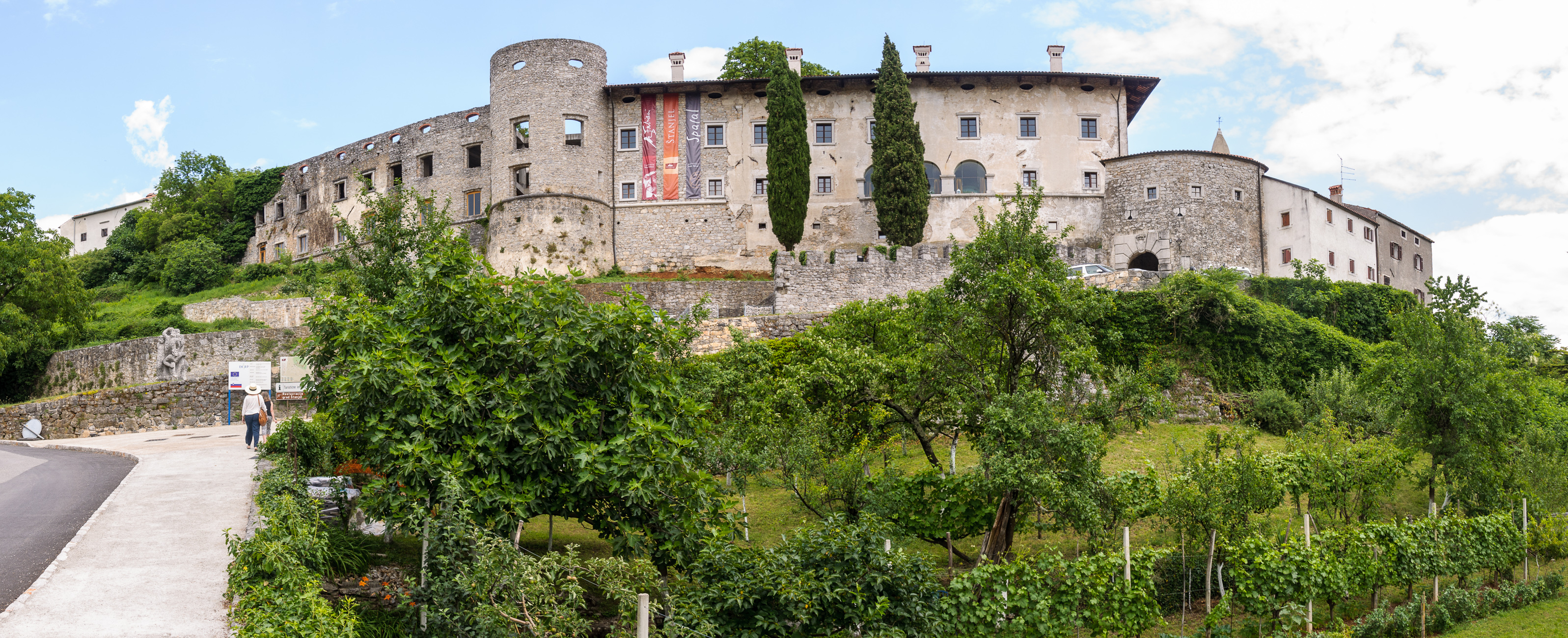 DSC_9693-Pano-2